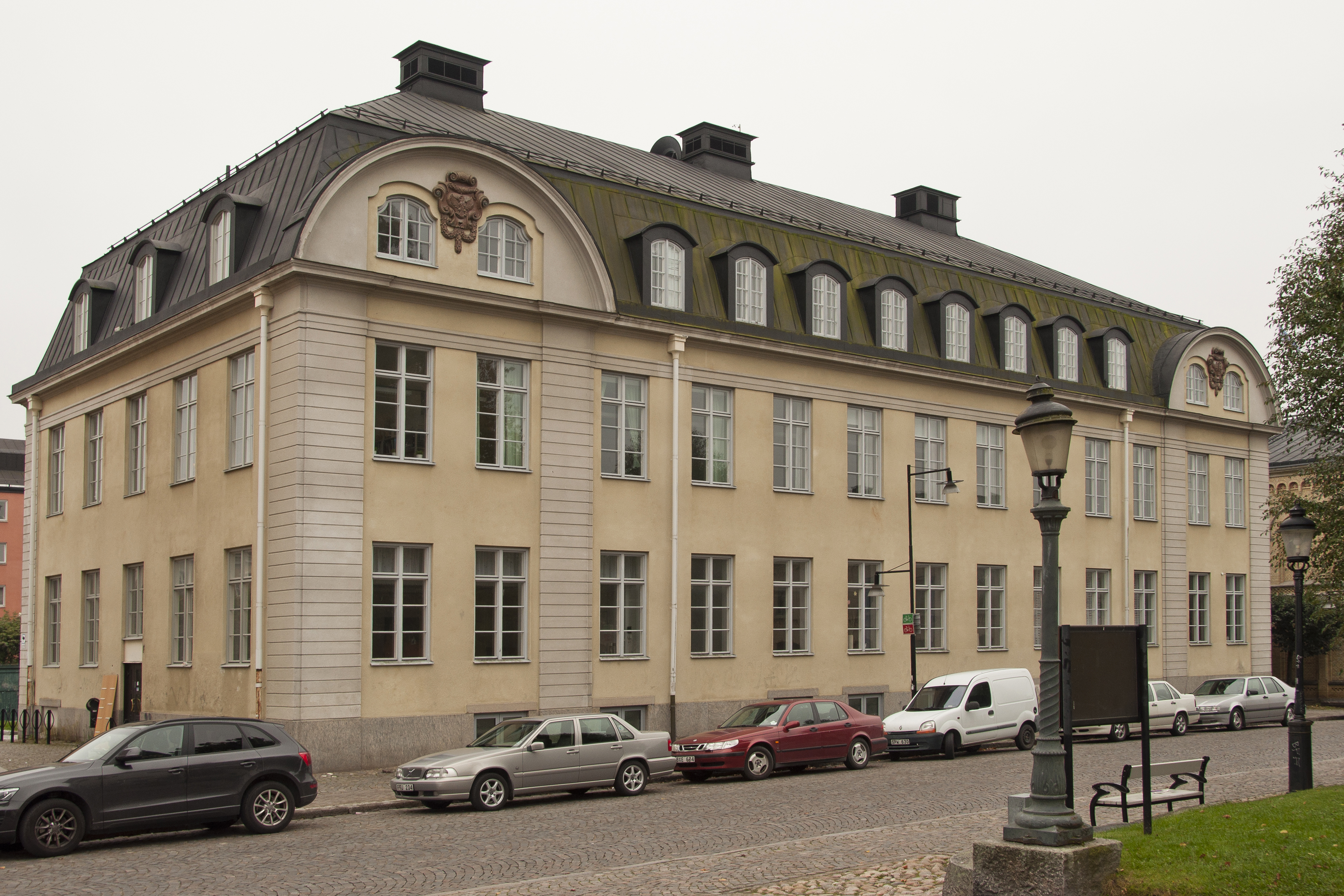 Annexet, Karlstads Allmänna Läroverk. Byggnadsår 1913. Arkitekter Hagström & Ekman